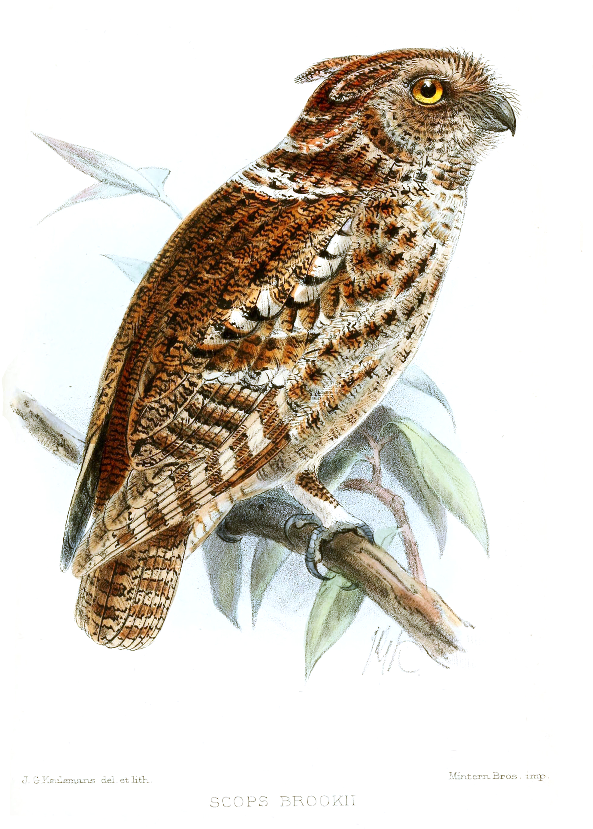 Scops brookii=Otus brookii